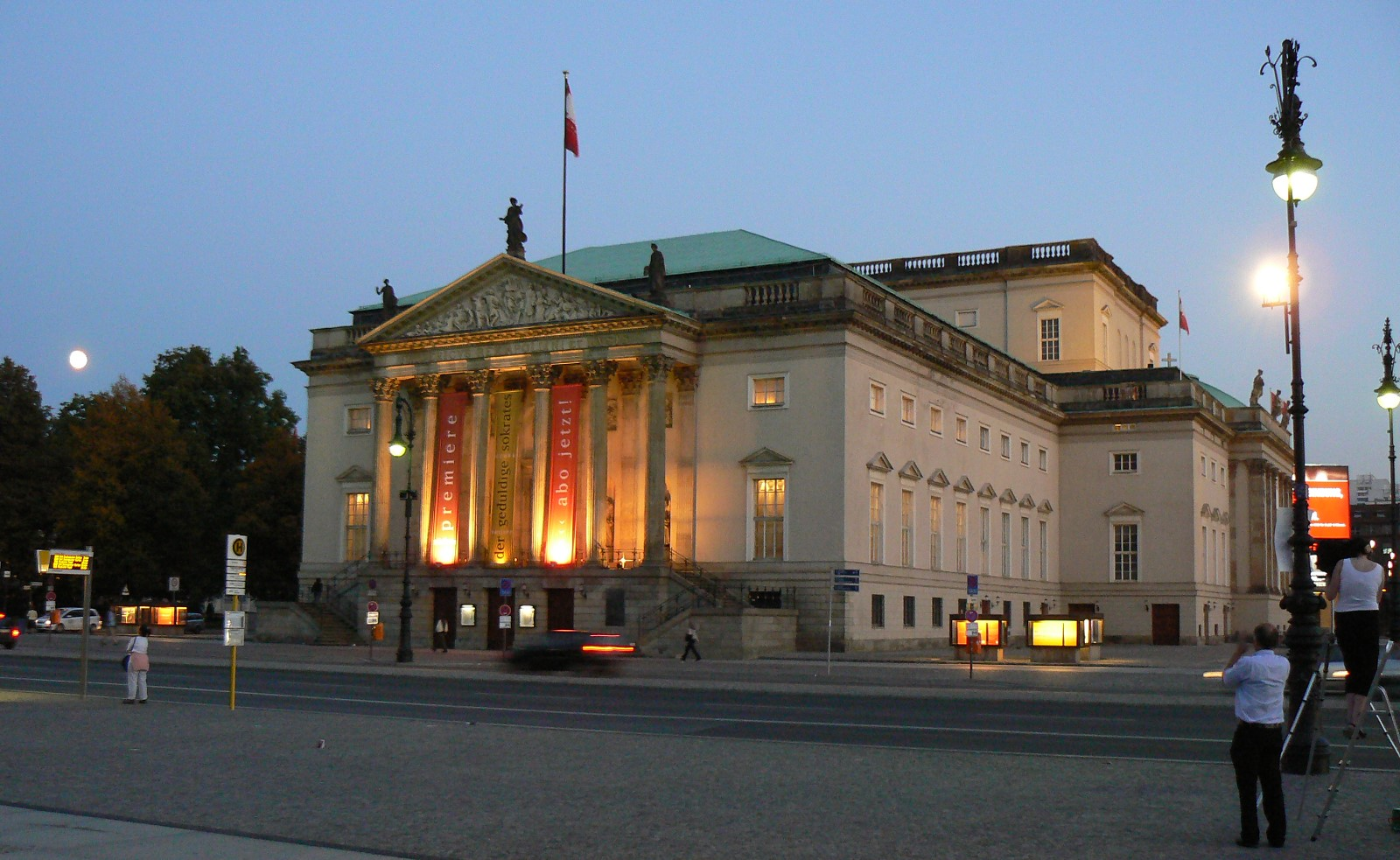 Die Berliner Staatsoper Unter den Linden in der Dämmerung.